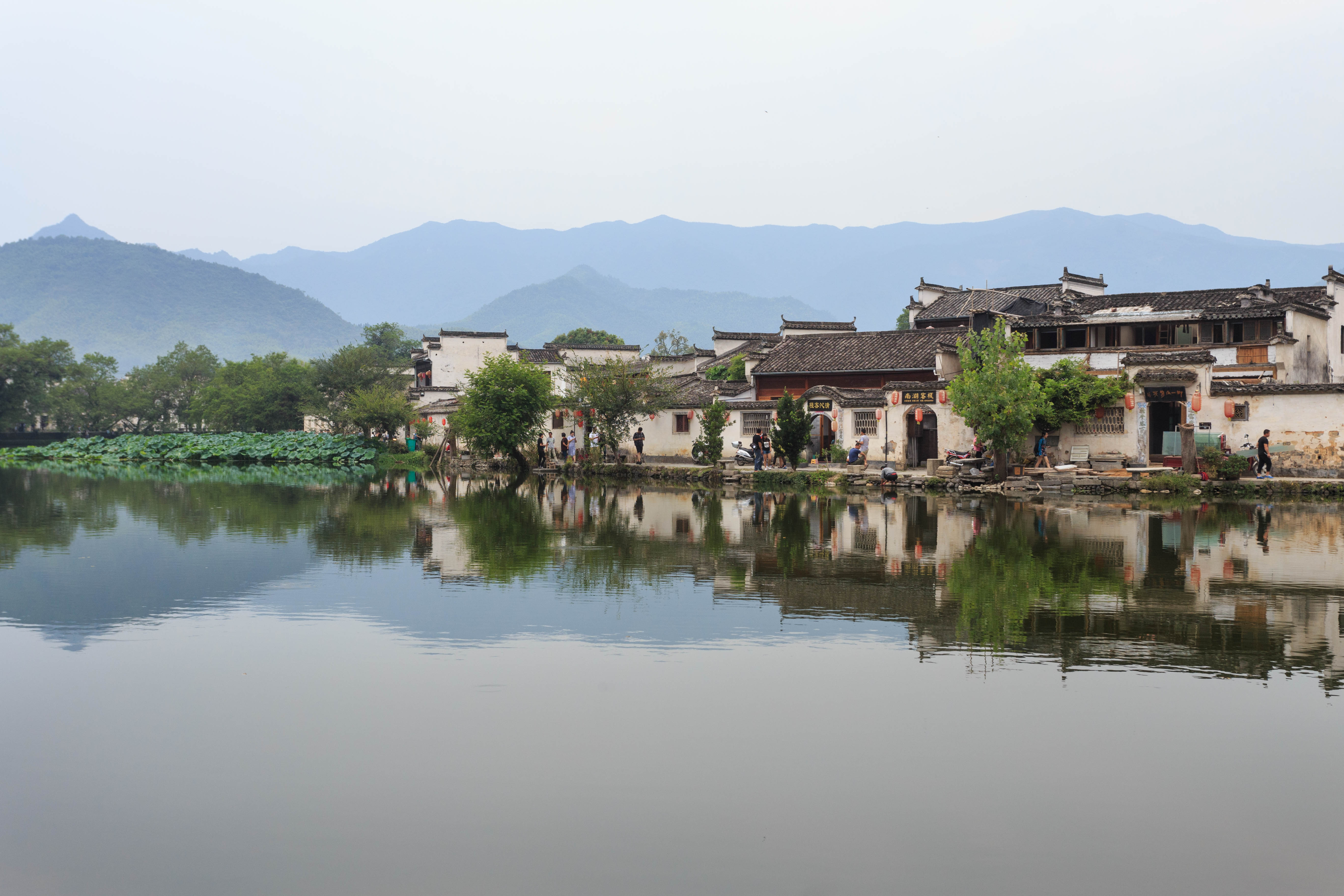 宏村南湖